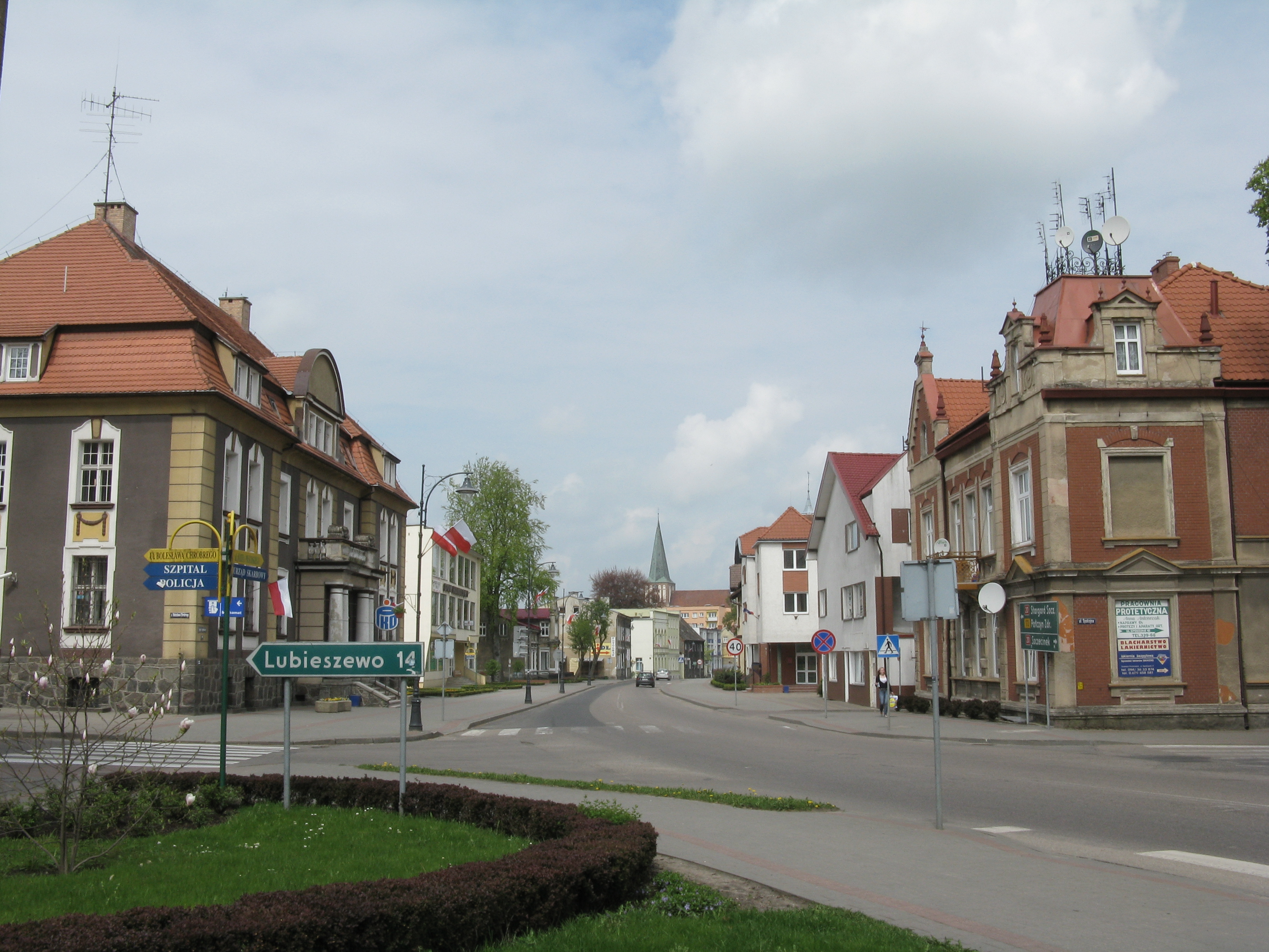 Drawsko Pomorskie, ulica Józefa Piłsudskiego widziana z Placu Elizy Orzeszkowej.